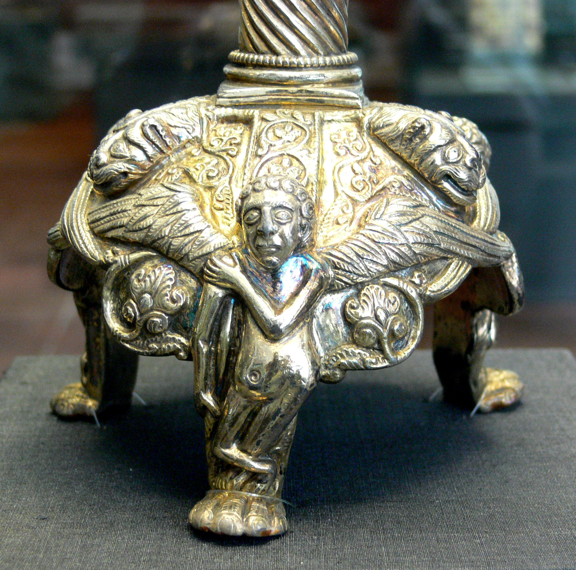 Welfenkreuz; Kunstgewerbemuseum Berlin; Inv. Nr. W 1